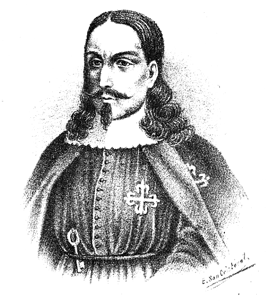 Pedro Álvarez de Toledo y Leiva, primer Marqués de Mancera (1585-1654), virrey del Perú.